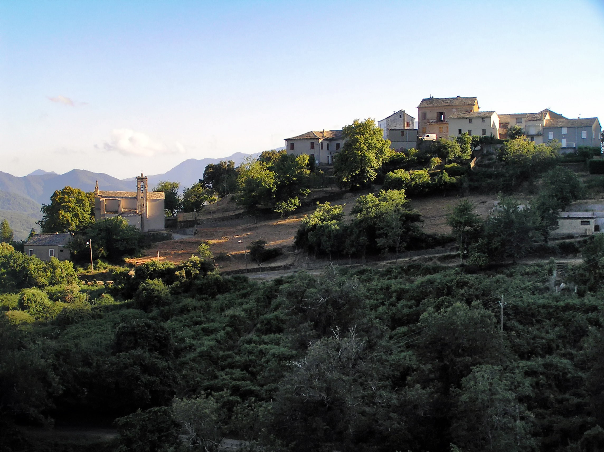 Piano, Castagniccia (Haute-Corse) - Vue du village et de son église Saint-Roch